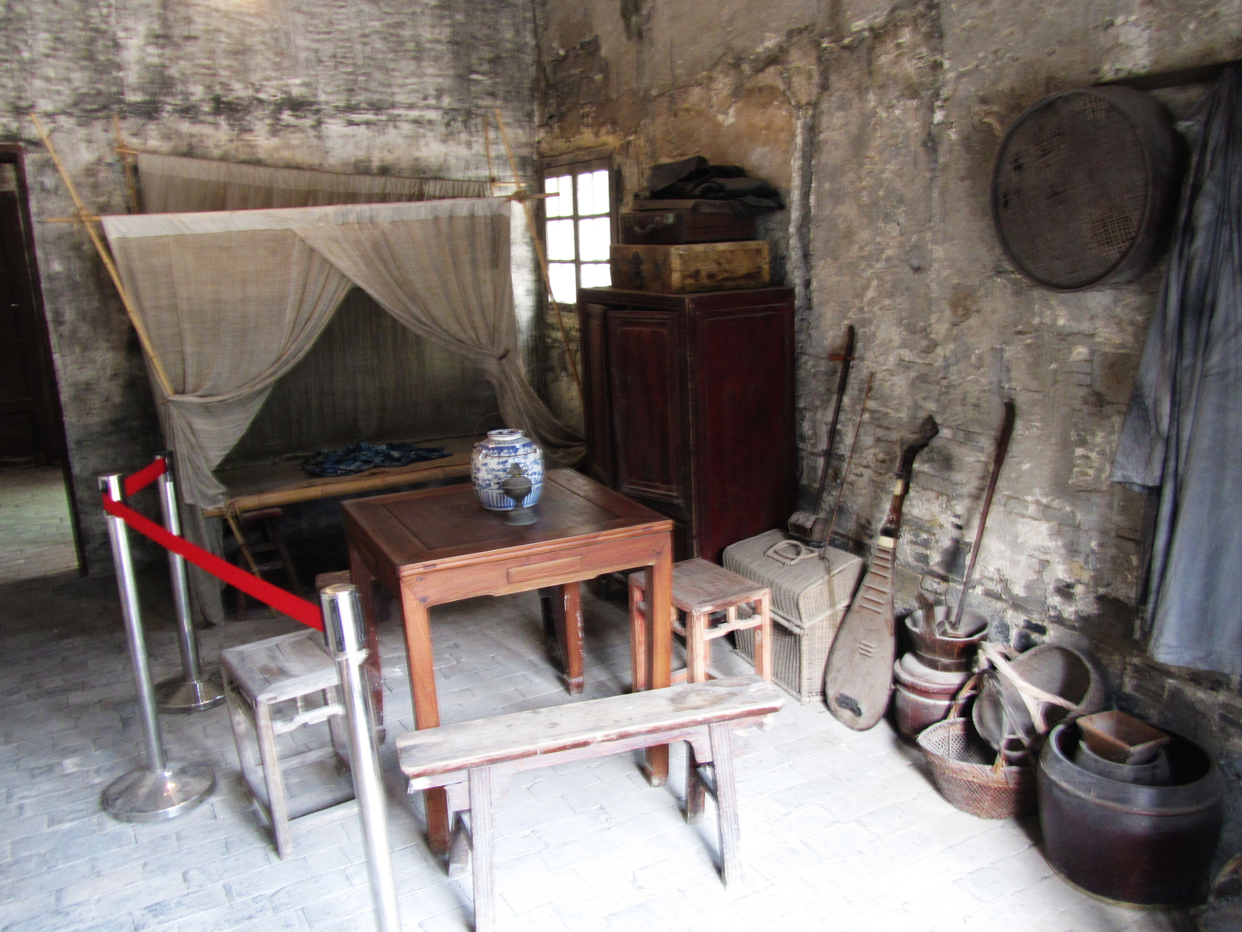 阿炳故居，室内复原陈列。